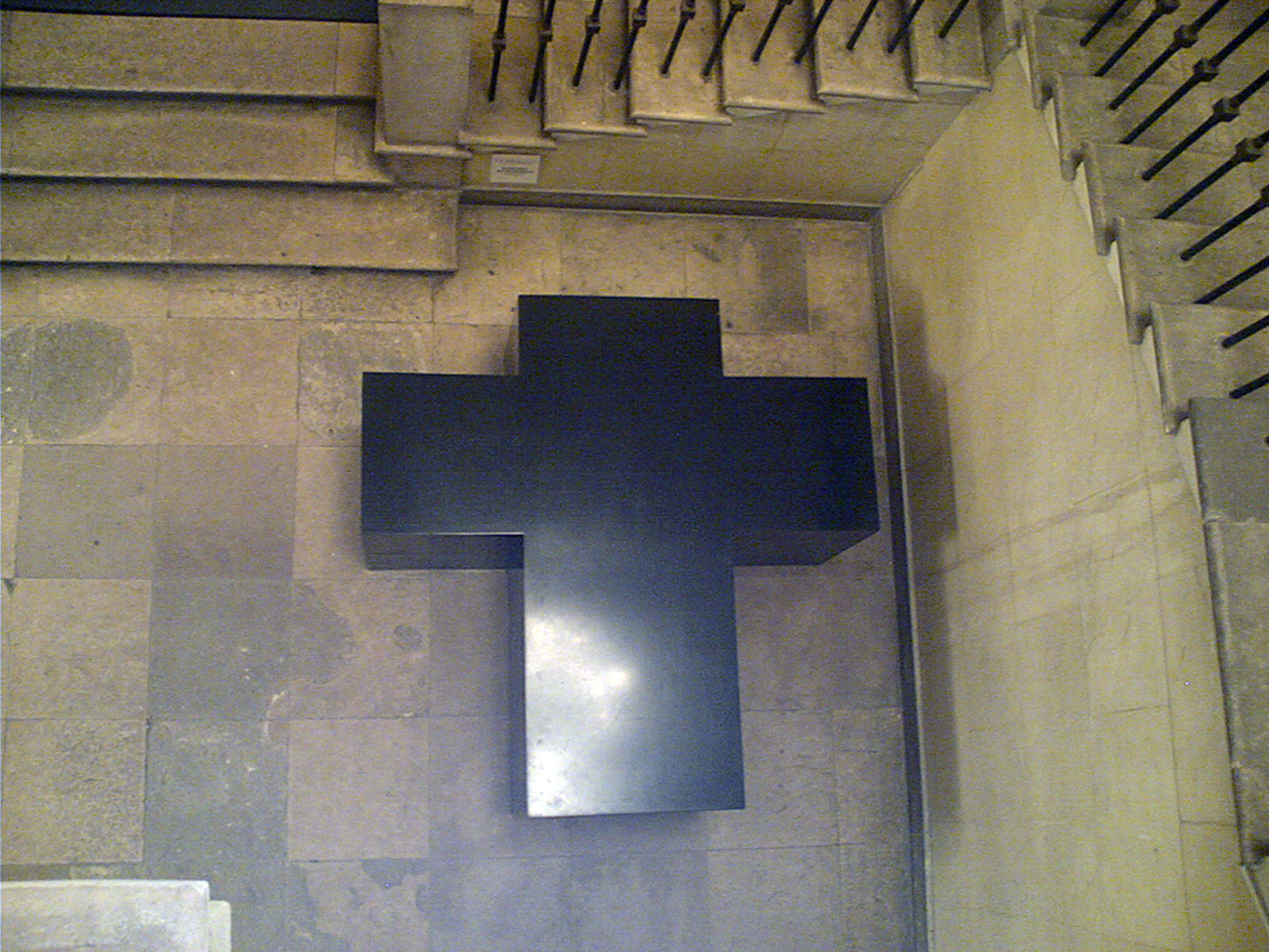 Boris Bernaskoni. Project.